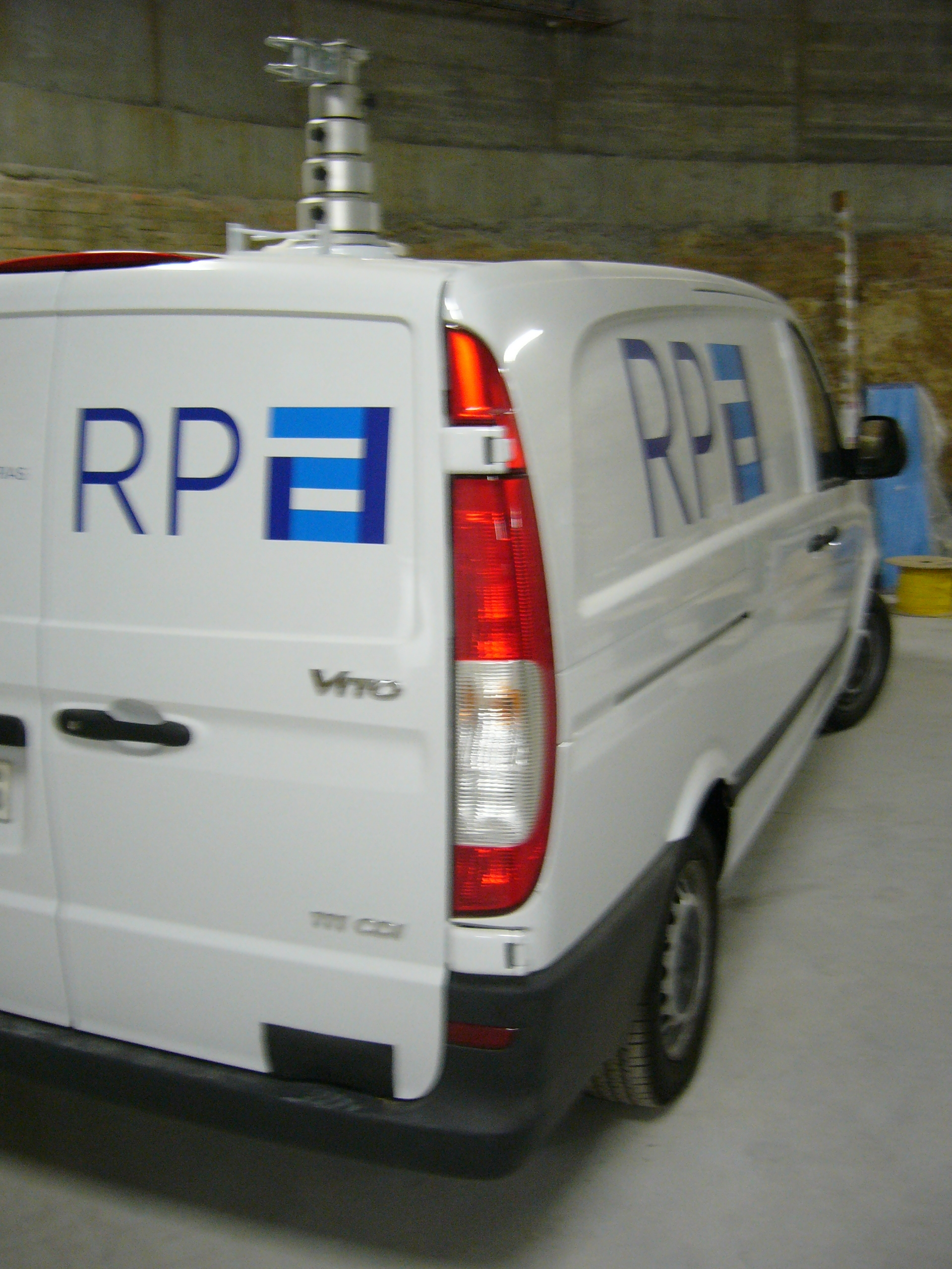 Unidá móvil de la RPA.